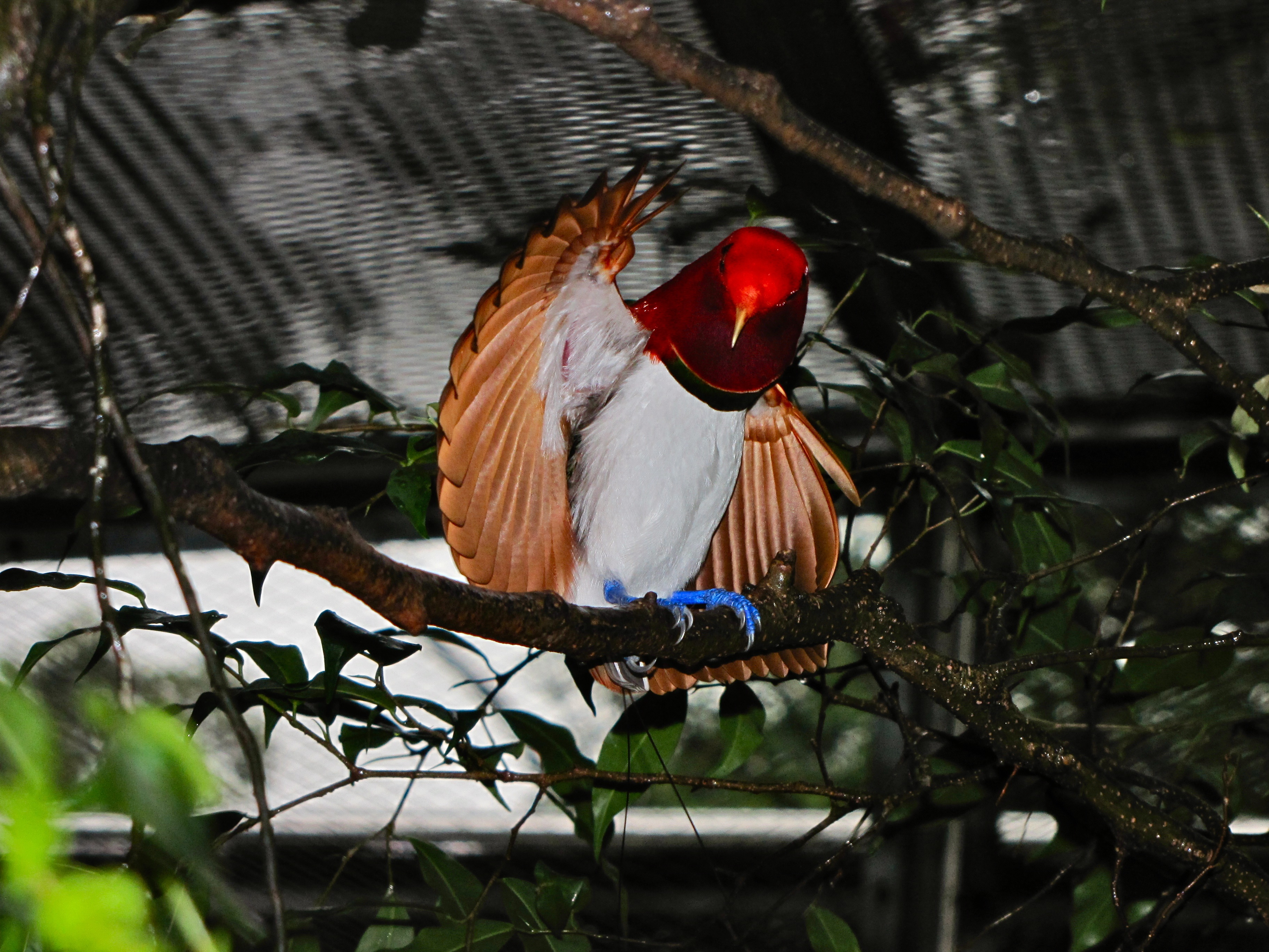 Bird Park Kuala Lumpur